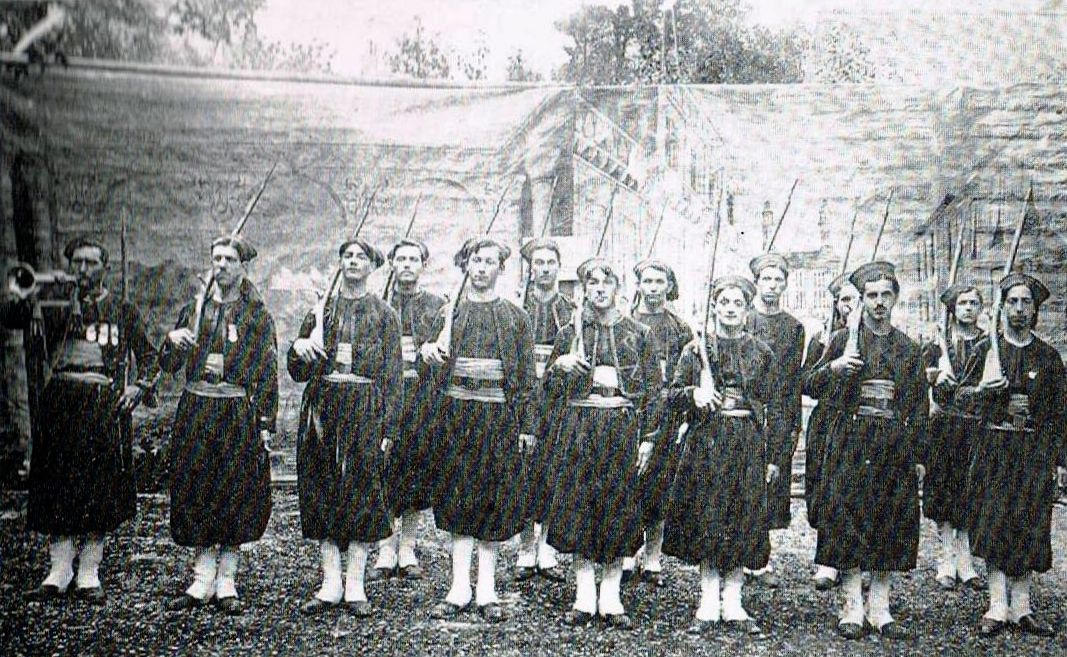 L'Union des Bousbots de Besançon, fin du XIXe/début XXe.